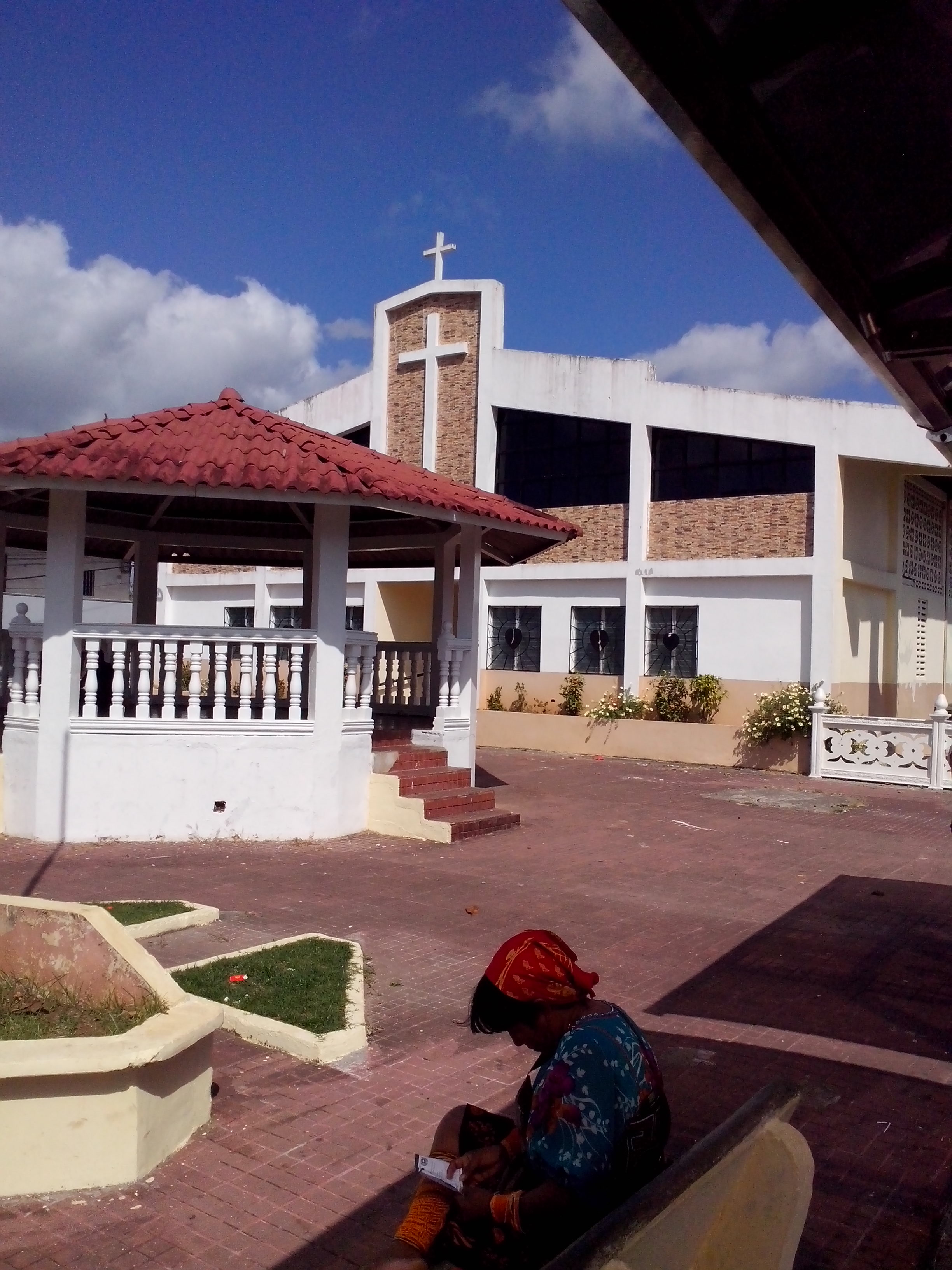 Arraijan, Panama